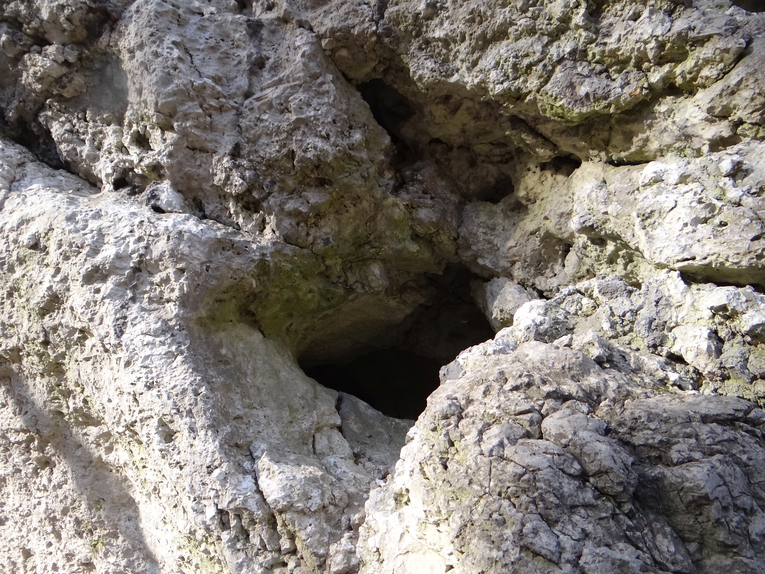 Schronisko Żarskie II w Dolinie Racławki